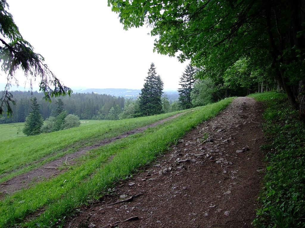 Droga pod Reglami w Tatrach Zachodnich po wschodniej stronie wylotu Doliny za Bramką